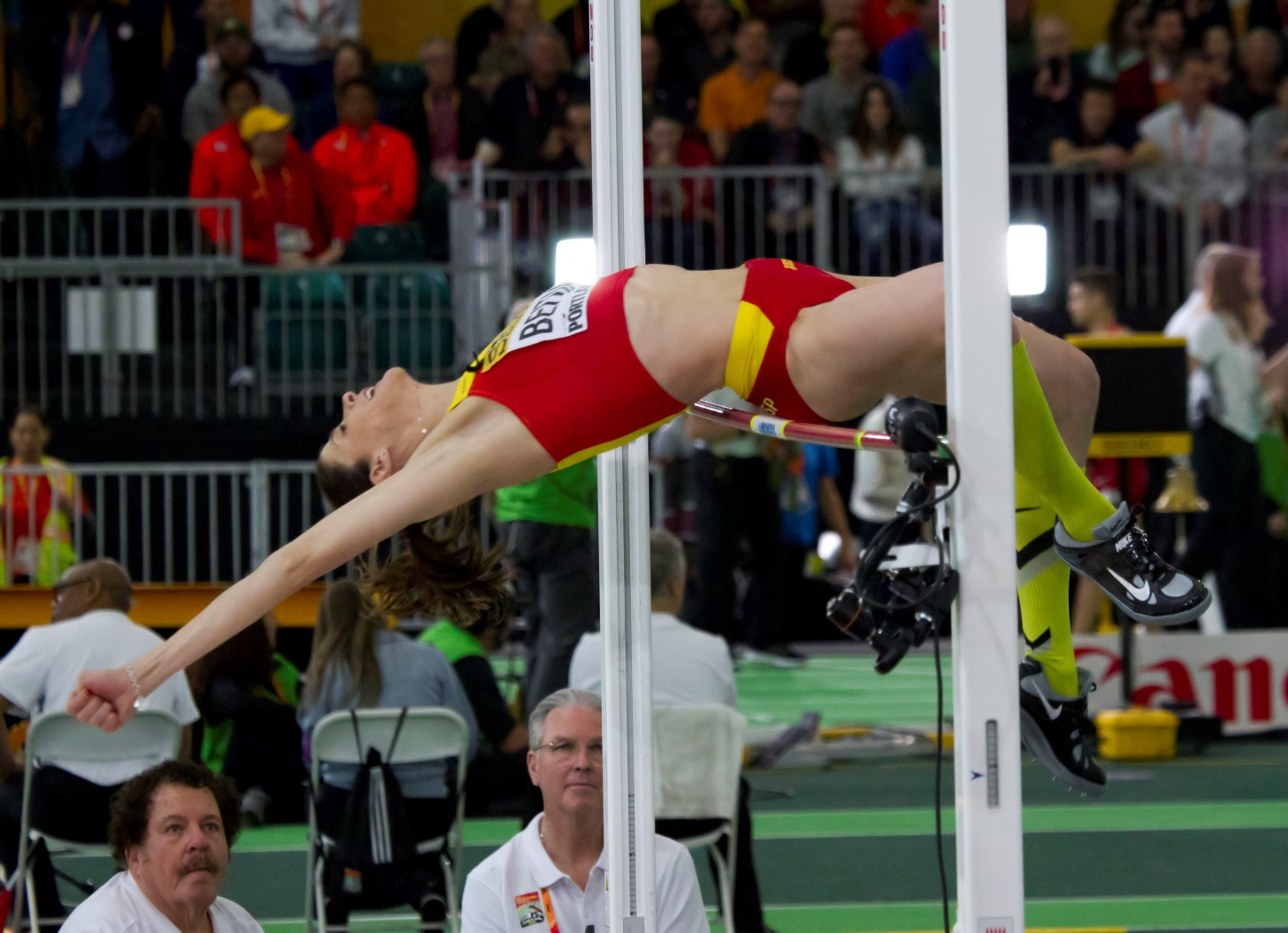 5174 beitia